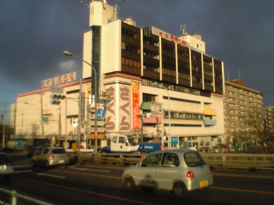 府中 中河原 2005年解体された、故、さくらサンリバー